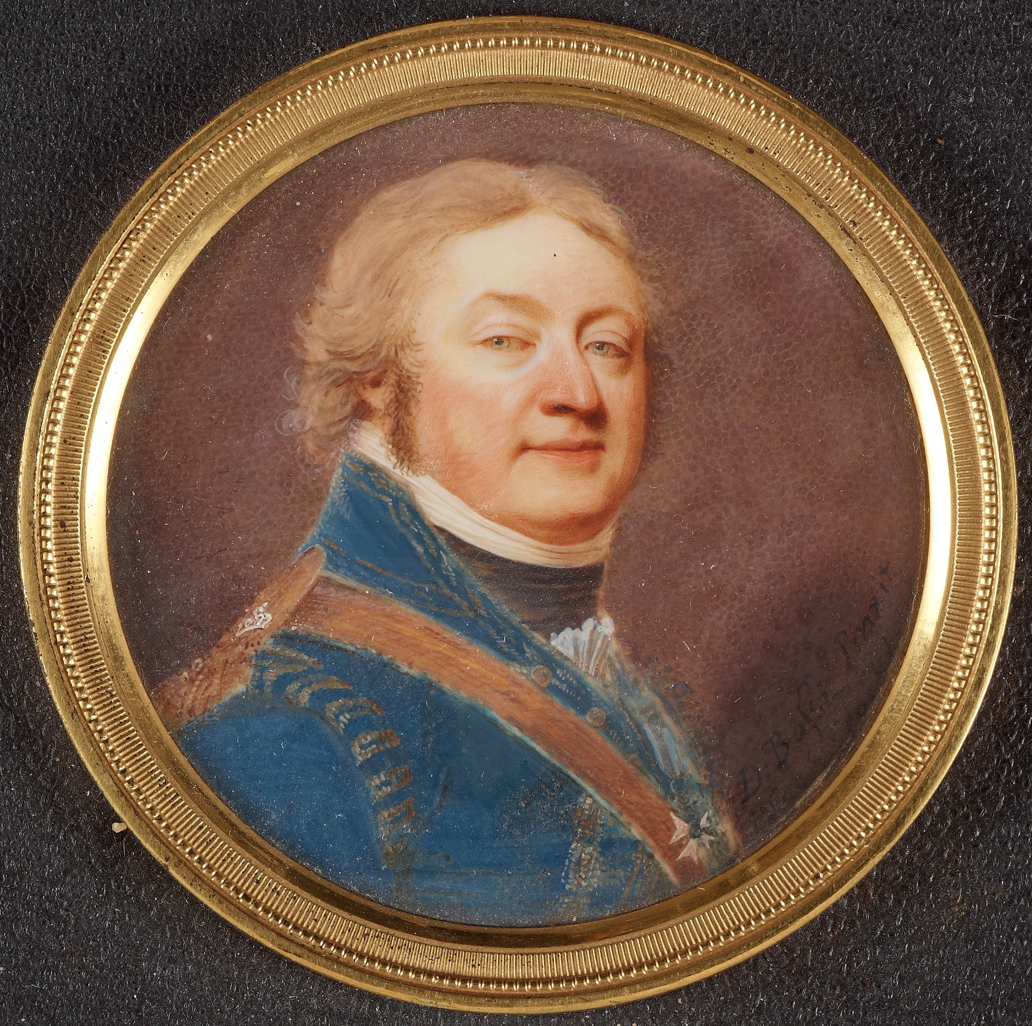 Porträtt av David Gustav Frölich (1757-1825) iklädd uniform m/1792 för en överstelöjtnant vid Smålands lätta dragonregemente. På bröstet syns Svärdsordens riddartecken. Ca 1798. Miniatyr. Signerad D: Bossi Pinxit, Stockholm. Gouache på ben 6 x 6 cm. Samtida svärtad och bronsinnefattad ram.